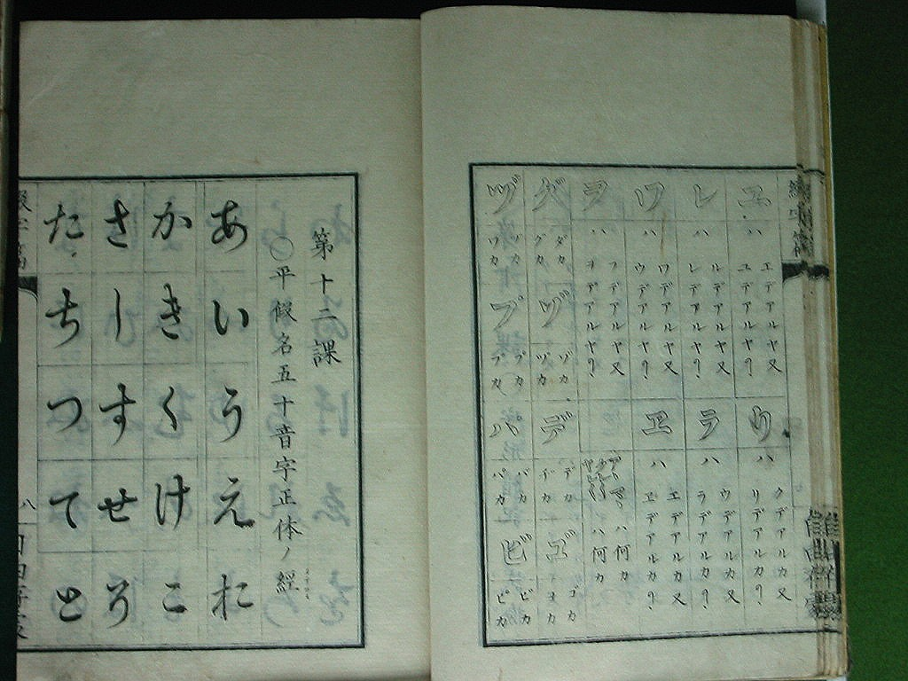 小学綴字篇 1873年 興雲閣(松江郷土館）にて